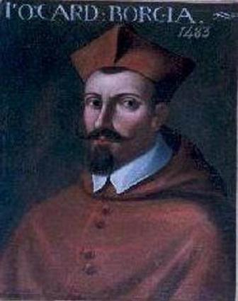 Cardenal Juan de Borja Llançol de Romaní, el mayor; nombrado, para dicha dignidad, por su tío el Papa Alejandro VI en 1492.